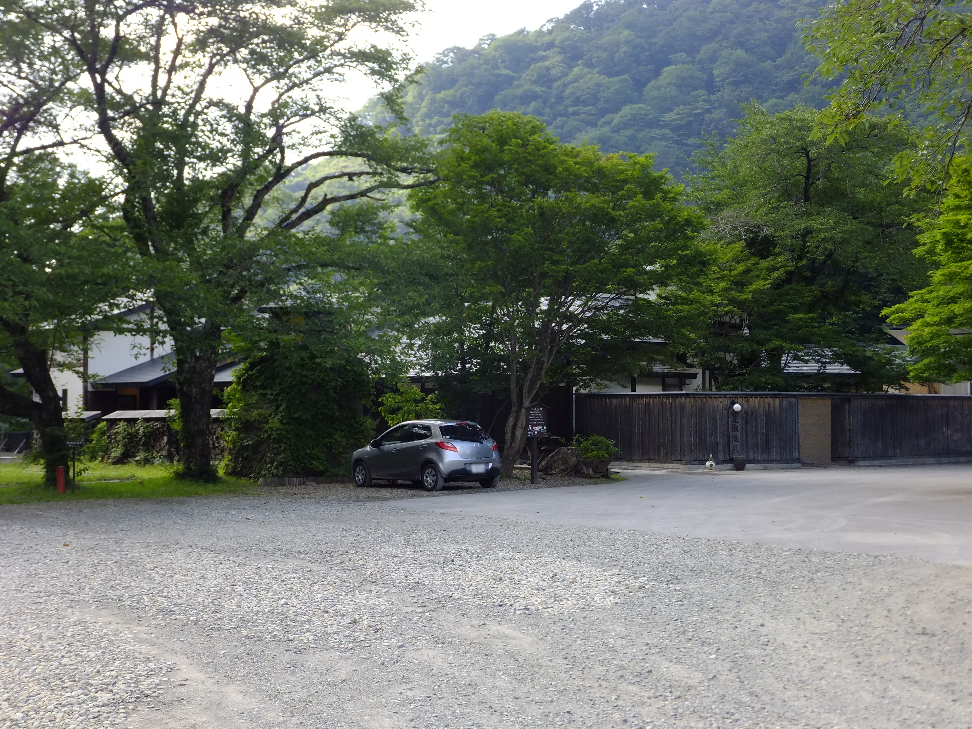 夏瀬温泉「都わすれ」(秋田県仙北市)